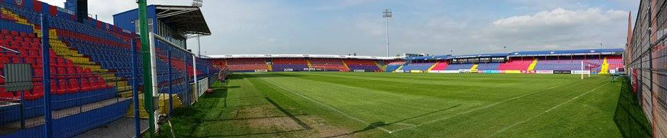 Stadionul Trans-sil